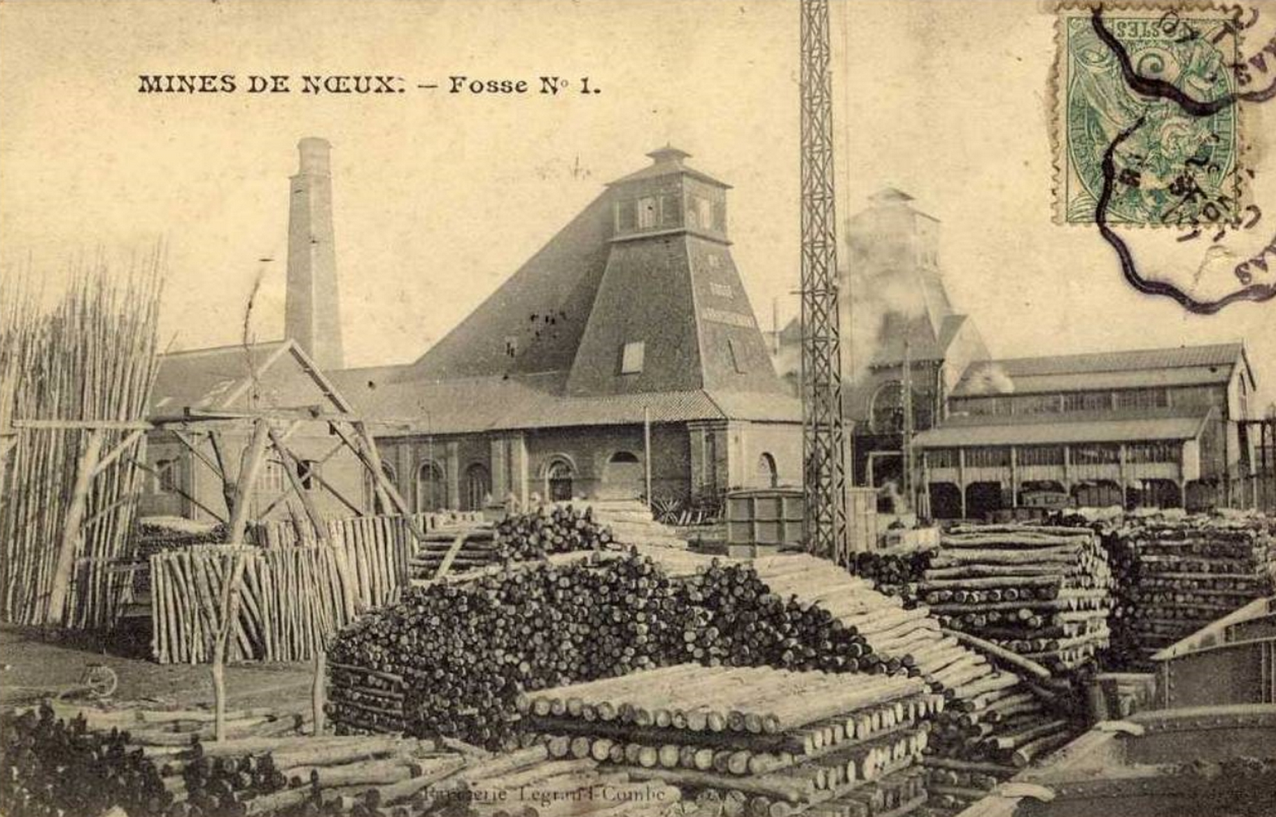 Fosse n° 1 - 1 bis de la Compagnie des mines de Nœux, Nœux-les-Mines, Pas-de-Calais, Nord-Pas-de-Calais, France.